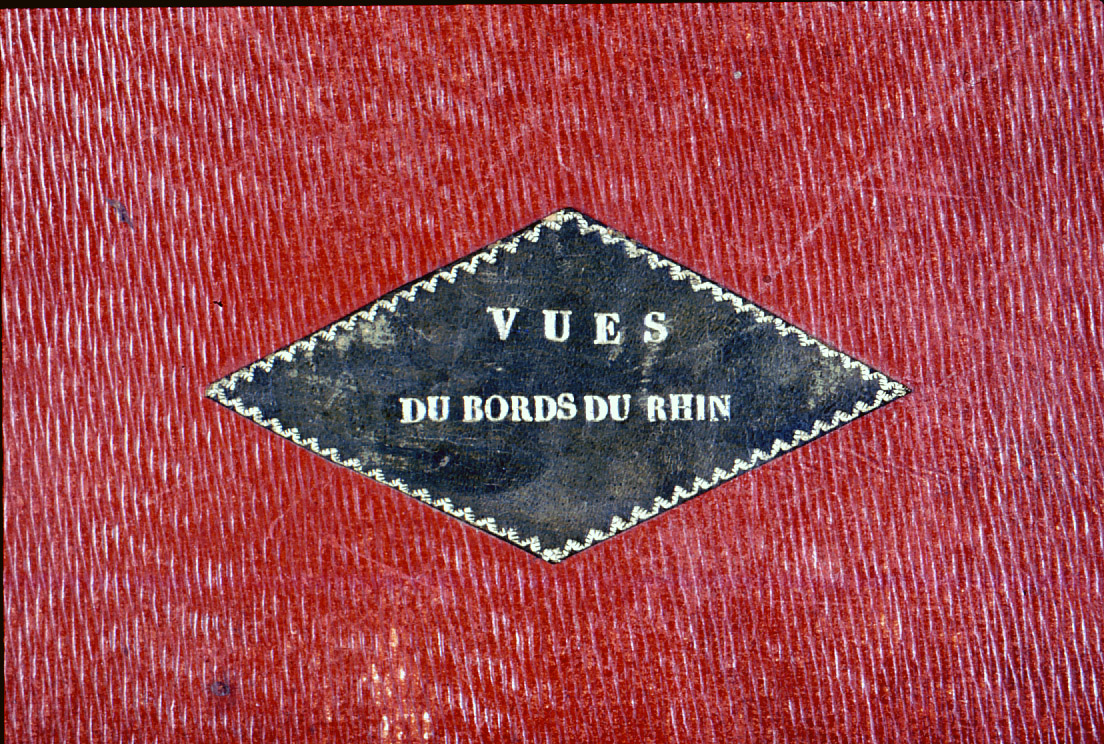 Buchdeckel Rheinalbum VUES DU BORDS DU RHIN mit Stichen von Rudolf Bodmer